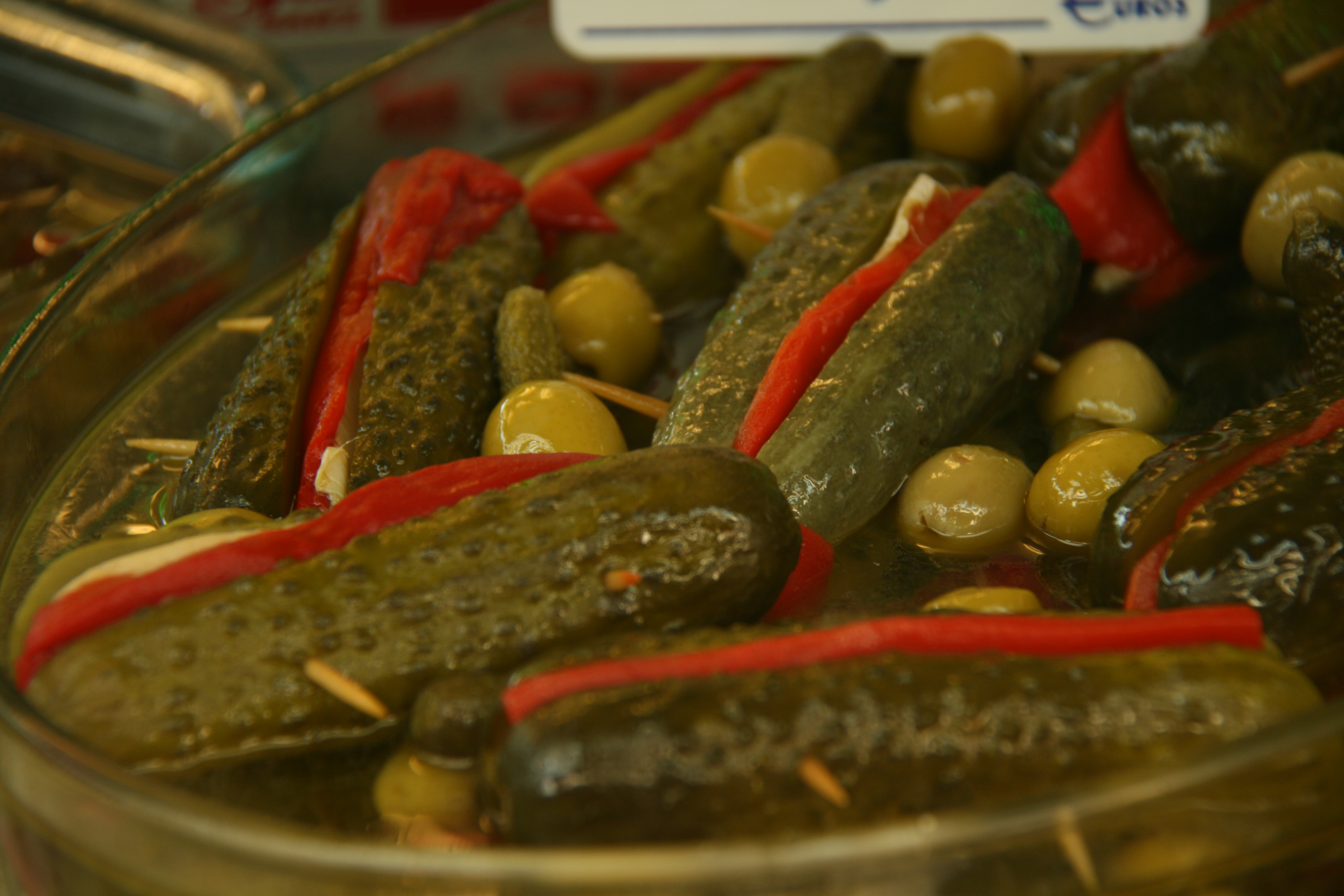 Ronaldos de Boquerón